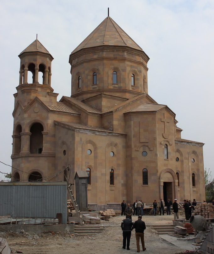 Фотография Церкви Святого Григория Просветителя (Днепропетровск)